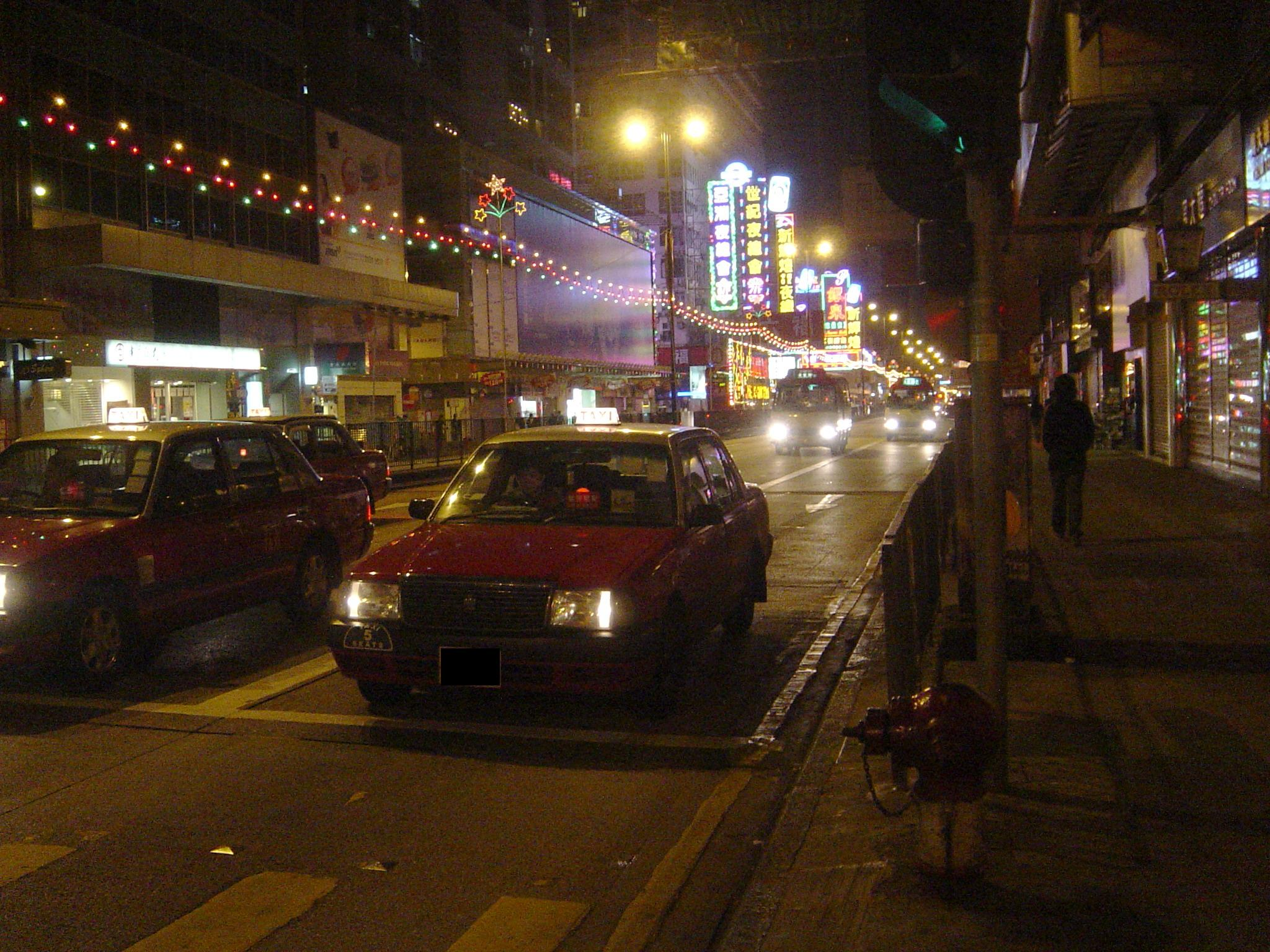 一輛泥鯭的停泊在香港彌敦道。A kind of taxi in Hong Kong.